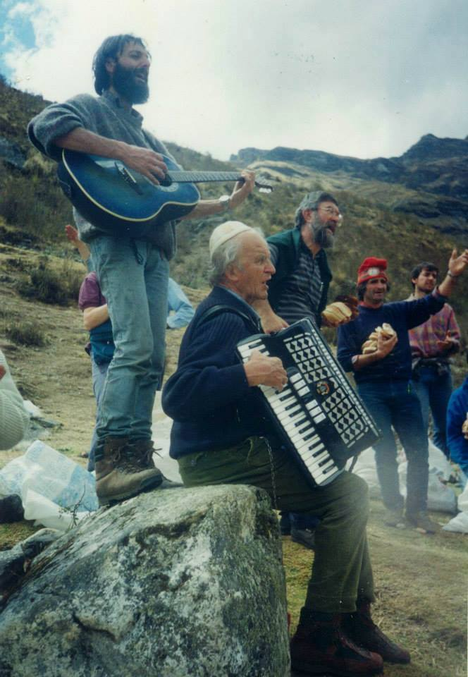 Los padres Ugo de Censi y Daniele Badiali en 1995, Huecroncocha, Chacas, Ancash, Perú